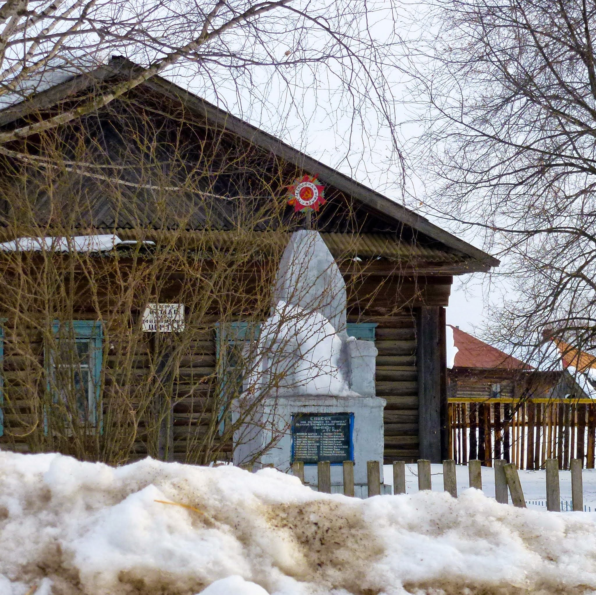 Старый Ашап